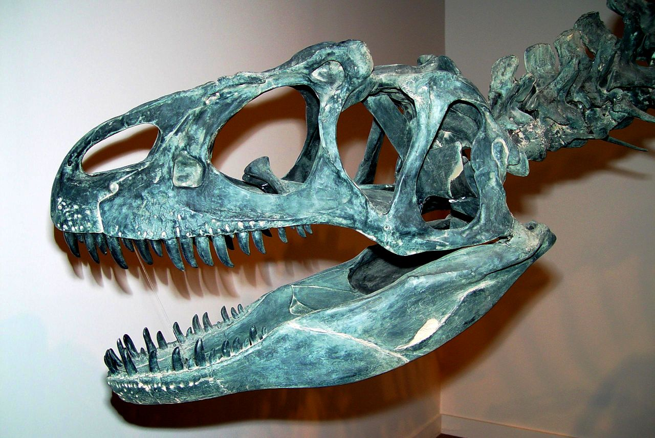 Allosaurus skull, Oklahoma Museum of Natural History.